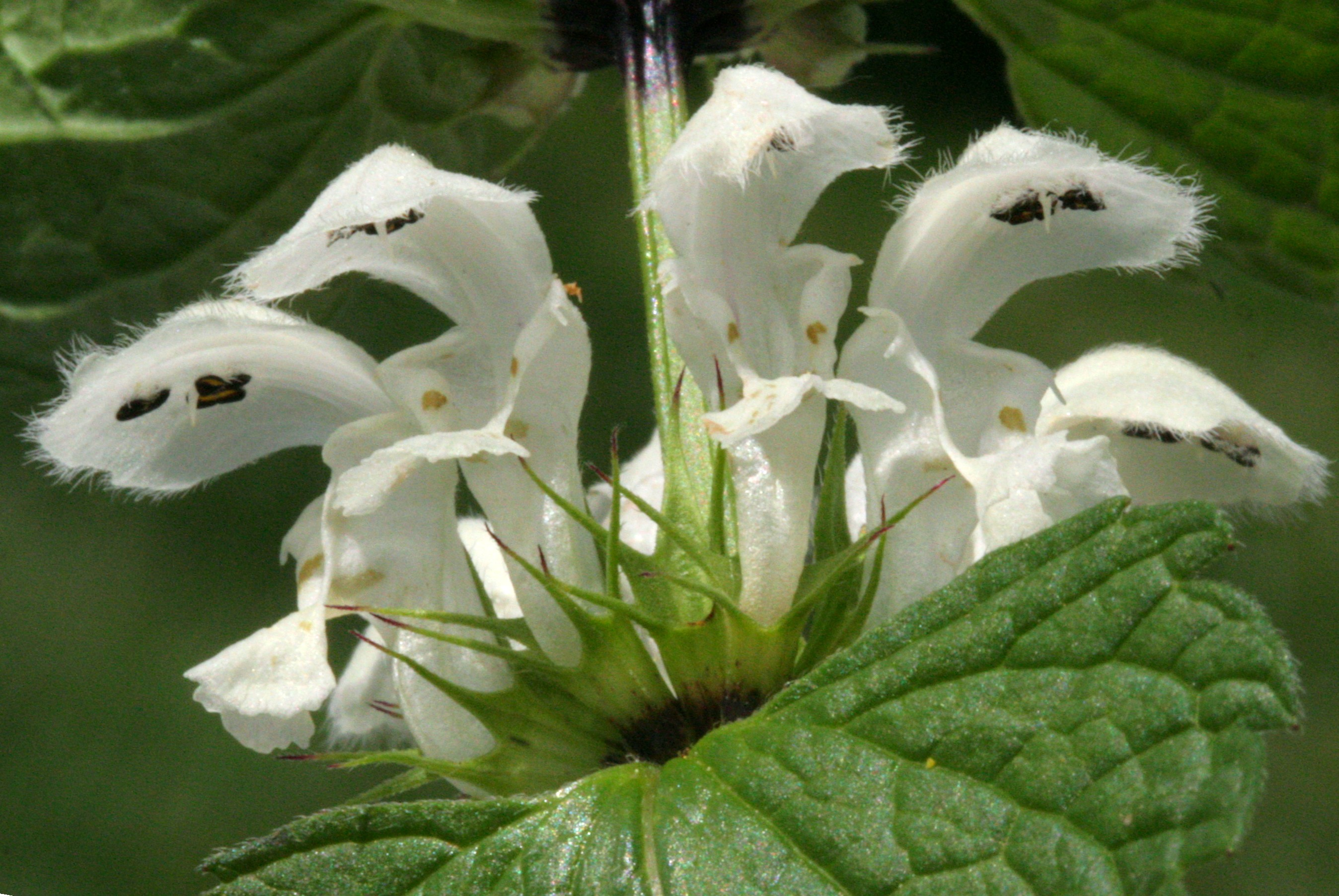 Falsa ortica bianca - Località : Cesa, Limana (BL), 330 m s.l.m.